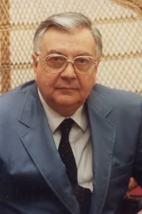 Antonio Braga fotografia personale per uso biografia